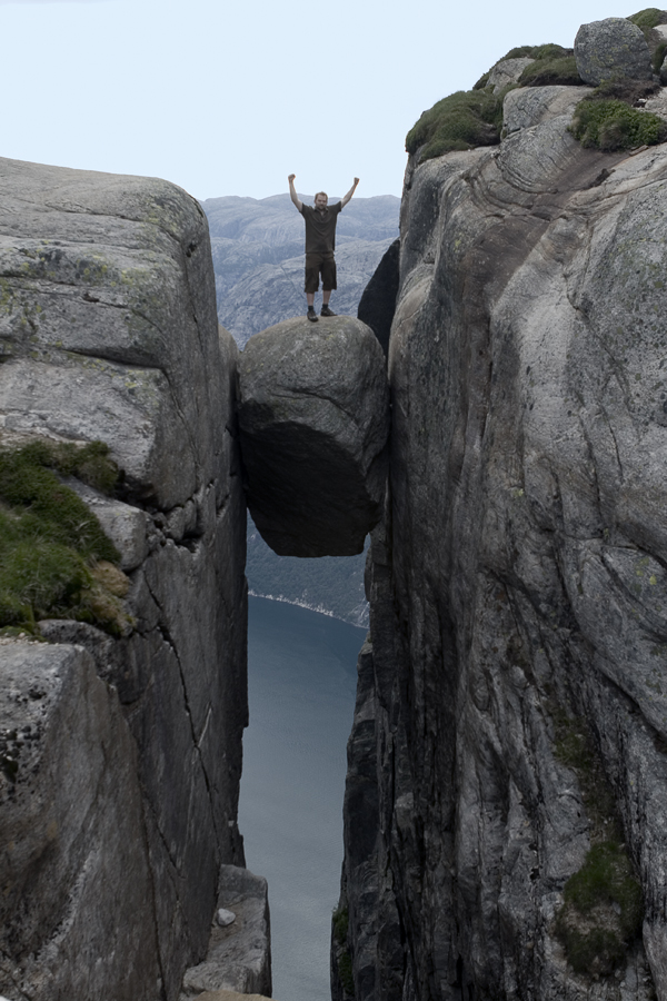 Kjeragbolten 1 km drop down to Lysefjorden